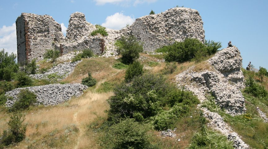 Novo Brdo fortress, Kosovo and Metohia, Serbia